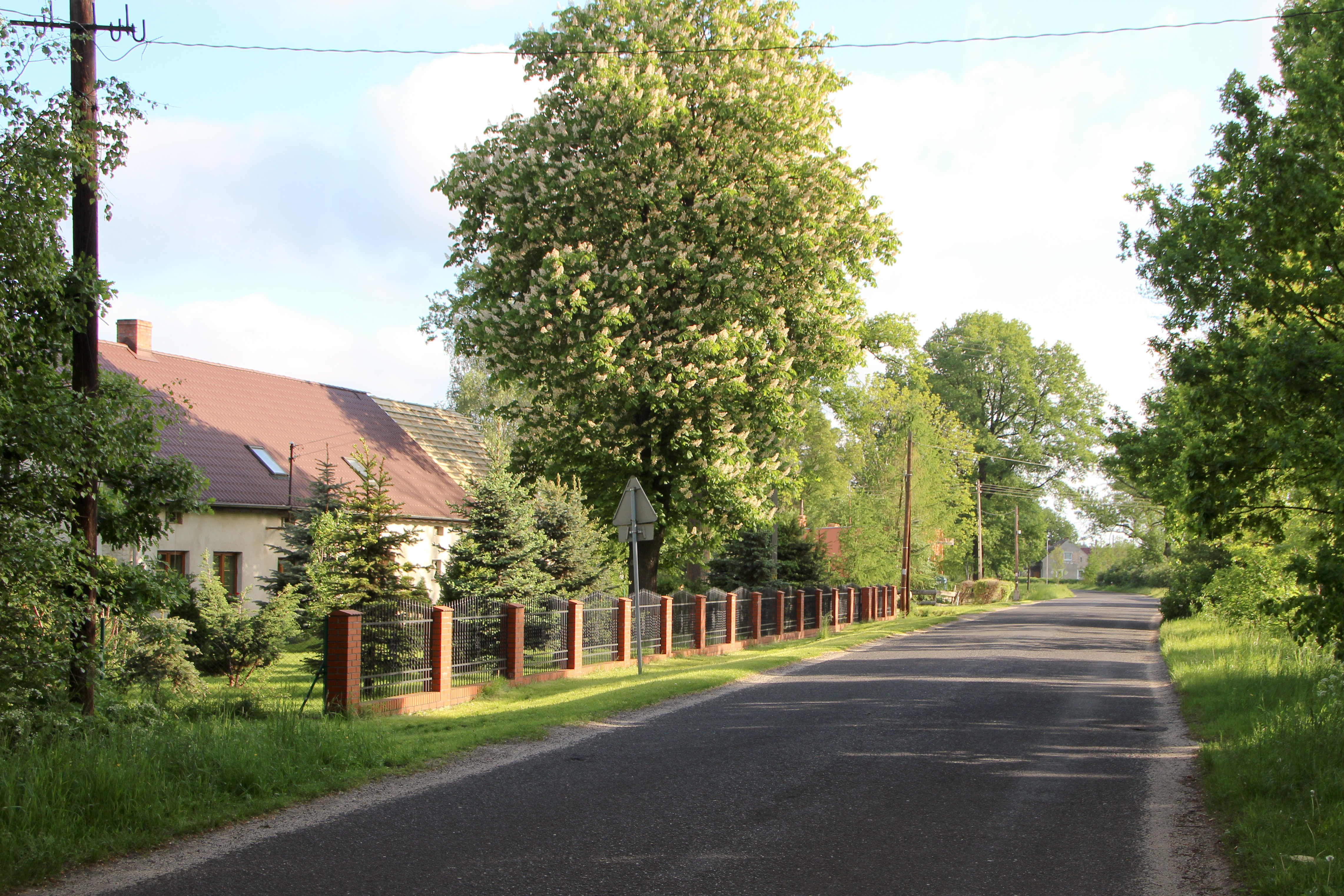 Doga w Stojanowie - wieś w Polsce w województwie dolnośląskim w powiecie zgorzeleckim, w gminie Pieńsk.